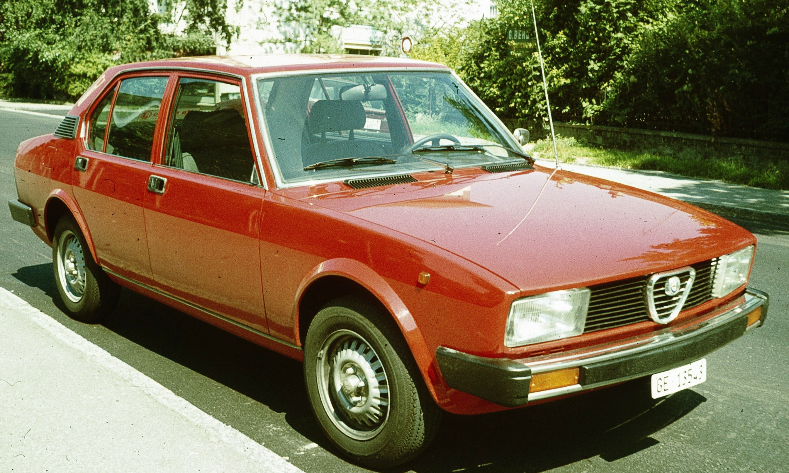 Alfetta from Geneva